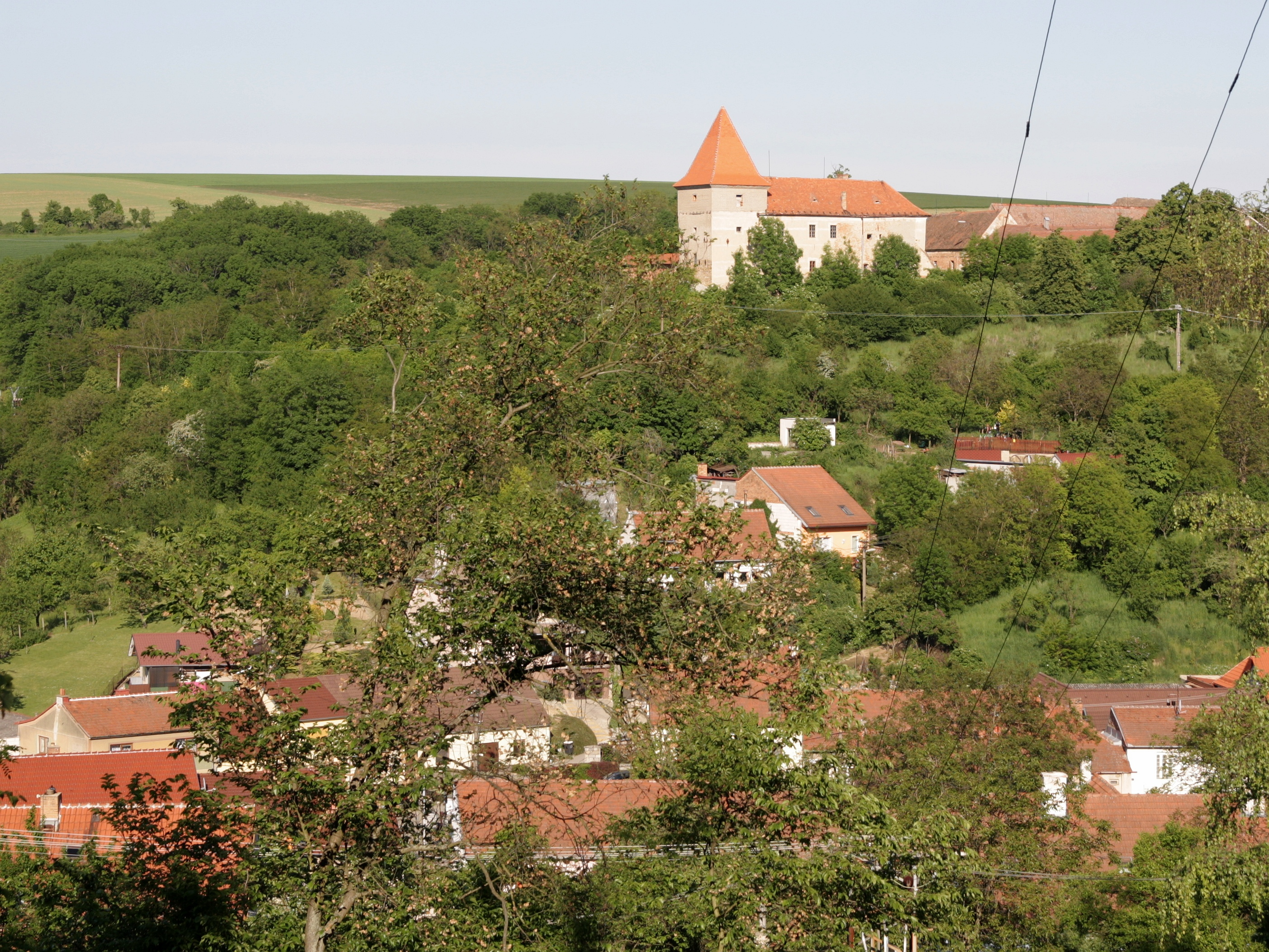 Bošovice - tvrz, pohled od západu, květen 2016.